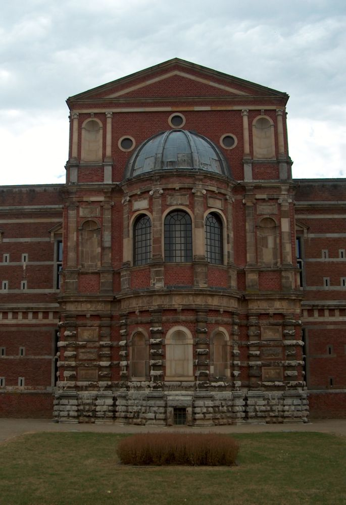 Ostfassade der Schloßkapelle in Jülich